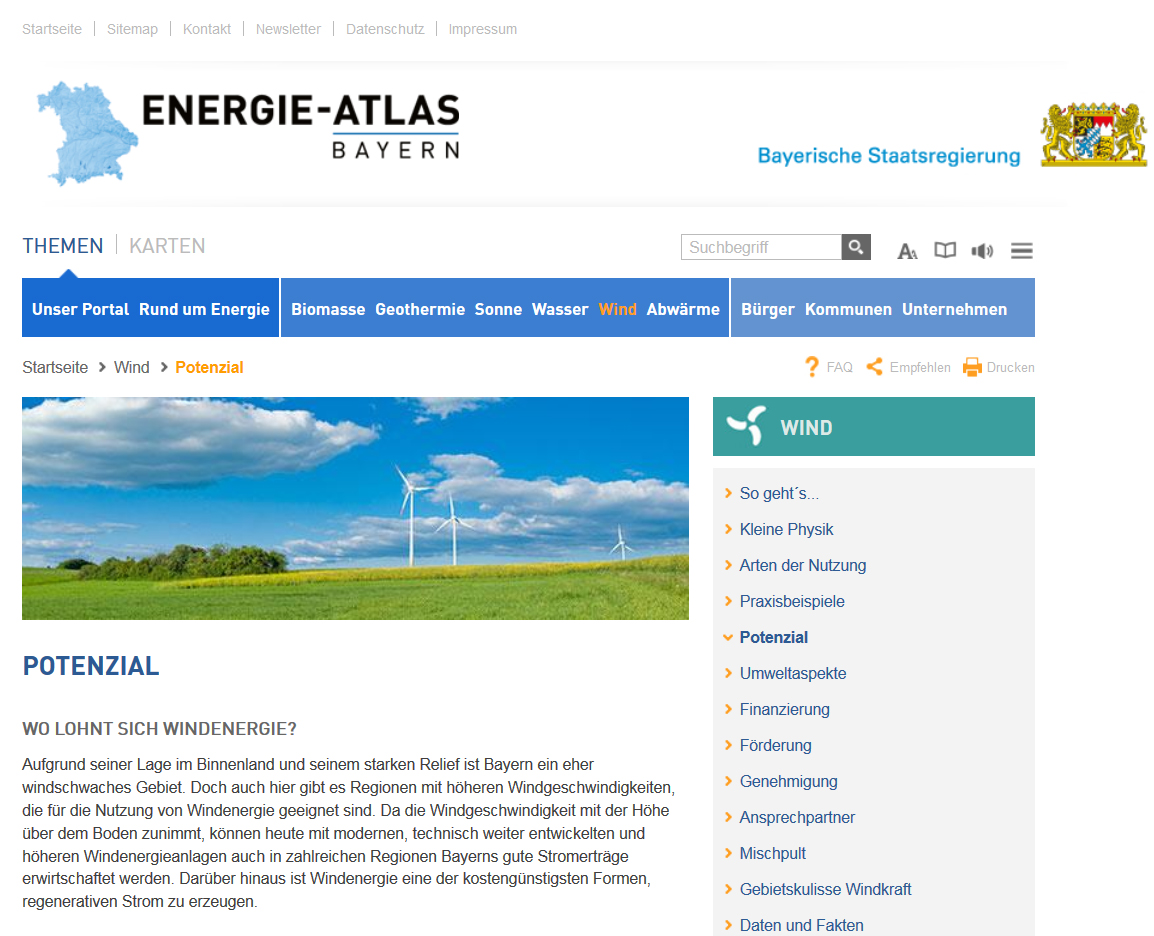 Screenshot des Bereichs "Potential" im Teil "Wind" des Energie-Atlas Bayern (